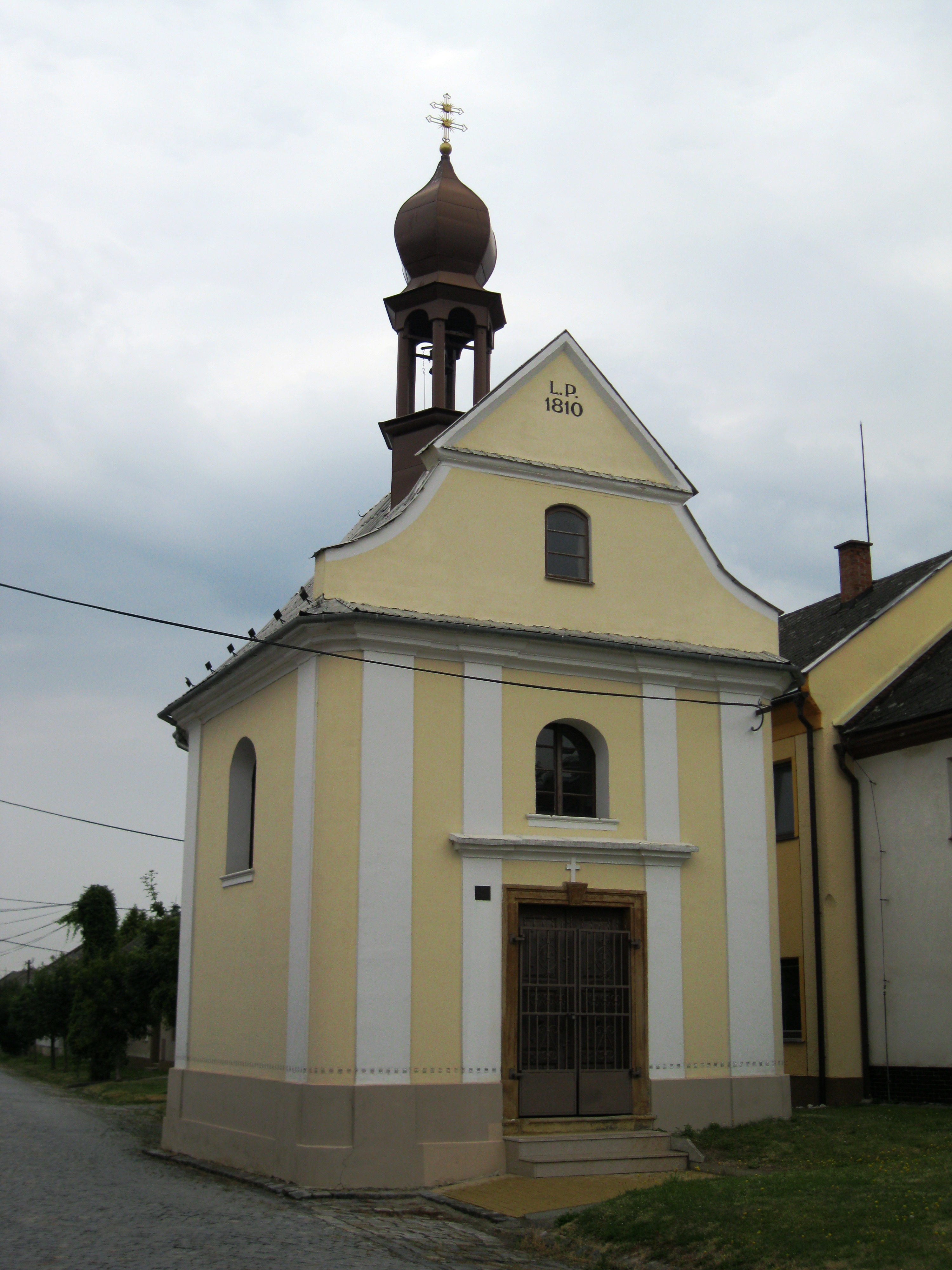 Kaple Neposkvrněného Početí P. Marie (Nasobůrky), náves, Nasobůrky